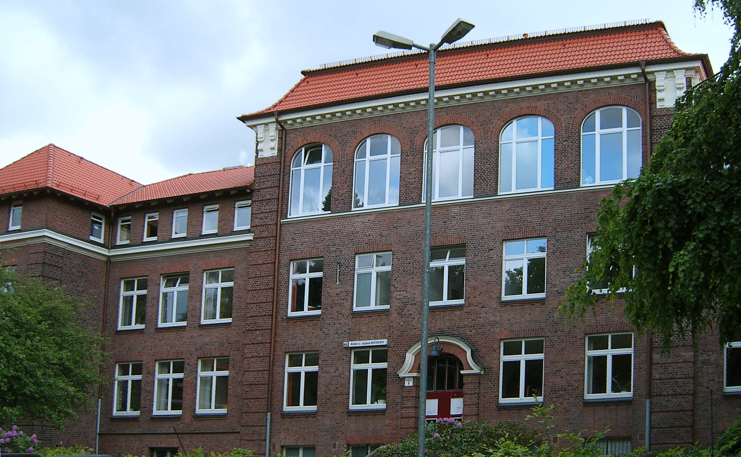 Bildbeschreibung: Hamburg, Ohlsdorf, Jugendheim Feuerbergstraße Fotograf: selbst Datum: 28.5.2006